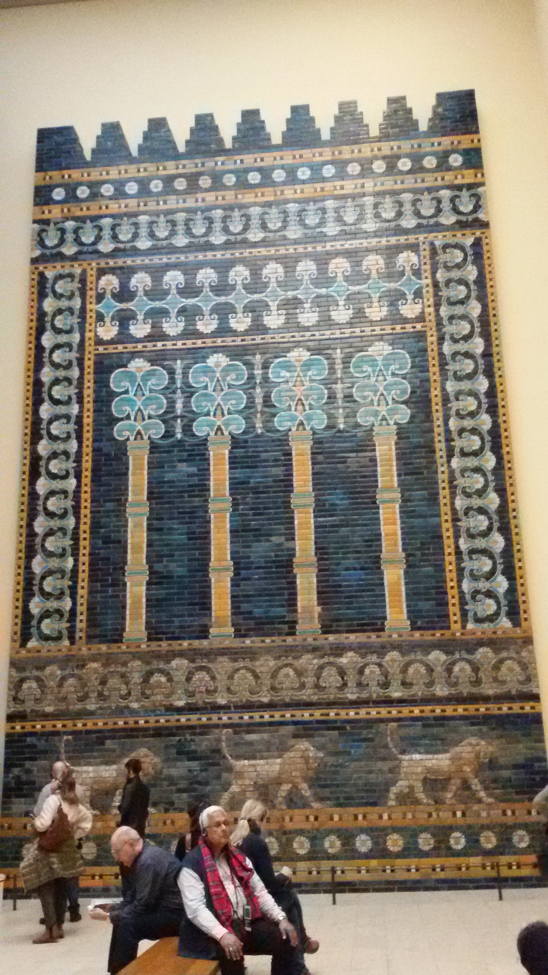 Decorations on the walls adjacent to the Ishtar Gate